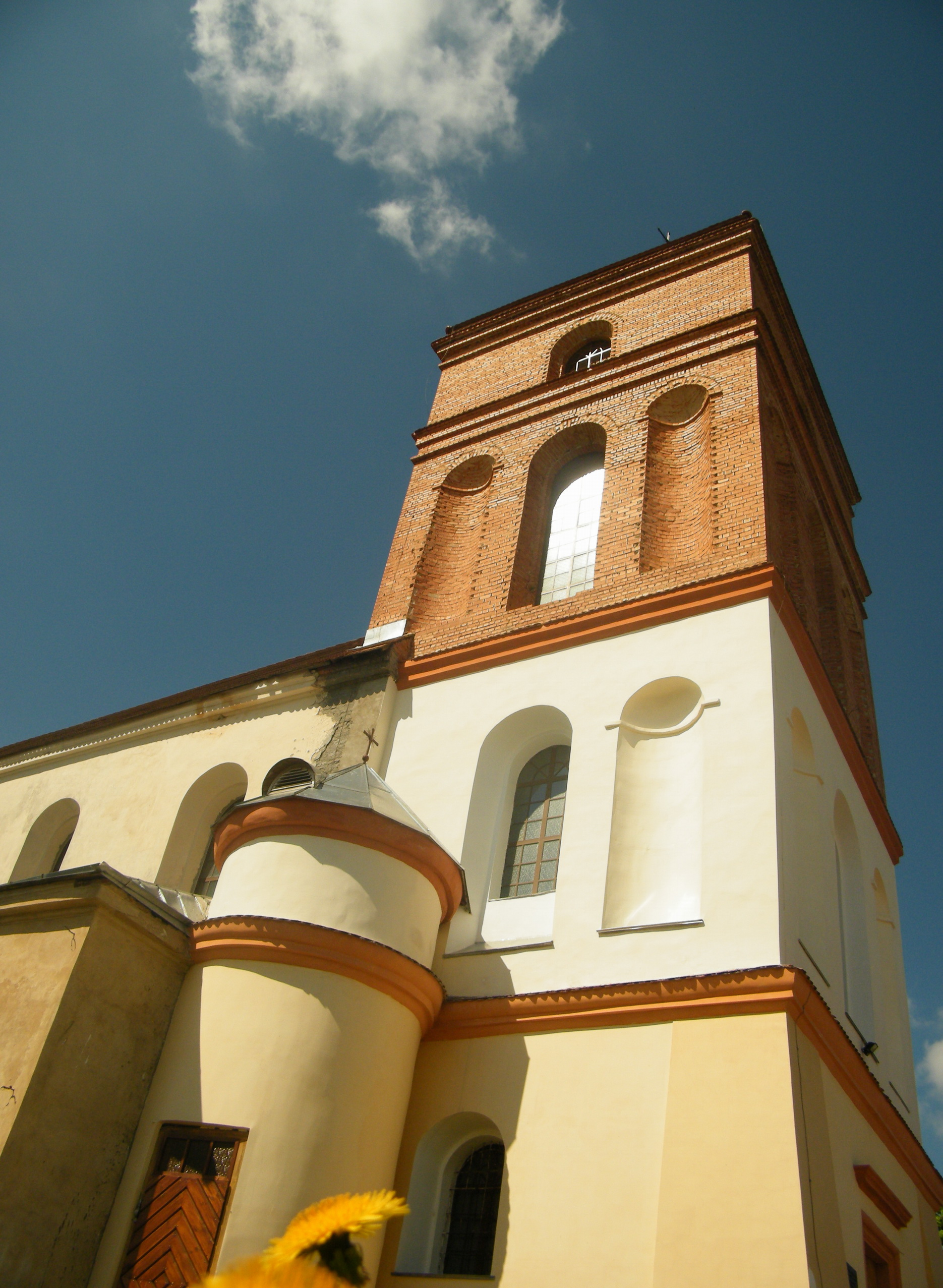 Беларуская (тарашкевіца): Комплекс Мікалаеўскага касьцёла:касьцёлбрама з агароджай і званіцайбудынак былых школы і шпіталя. г.п. Мір This is a photo of Belarusian heritage monument. Reference number: 411Г000319 ( WLM)